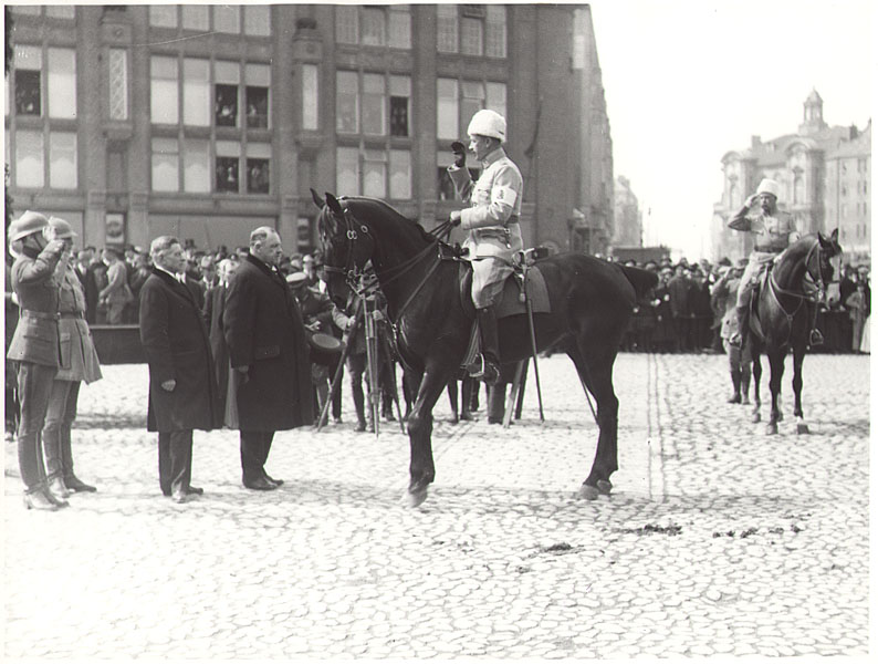 Mannerheim greeting troops in Helsinki 1918